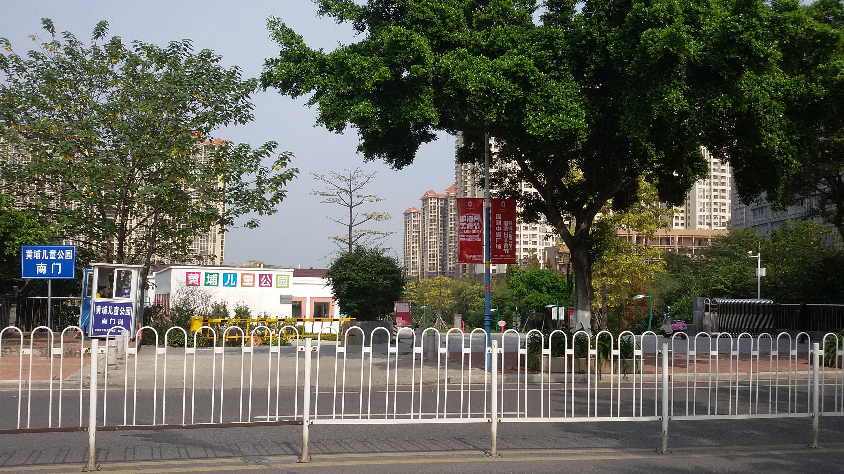 粵語: 黃埔兒童公園